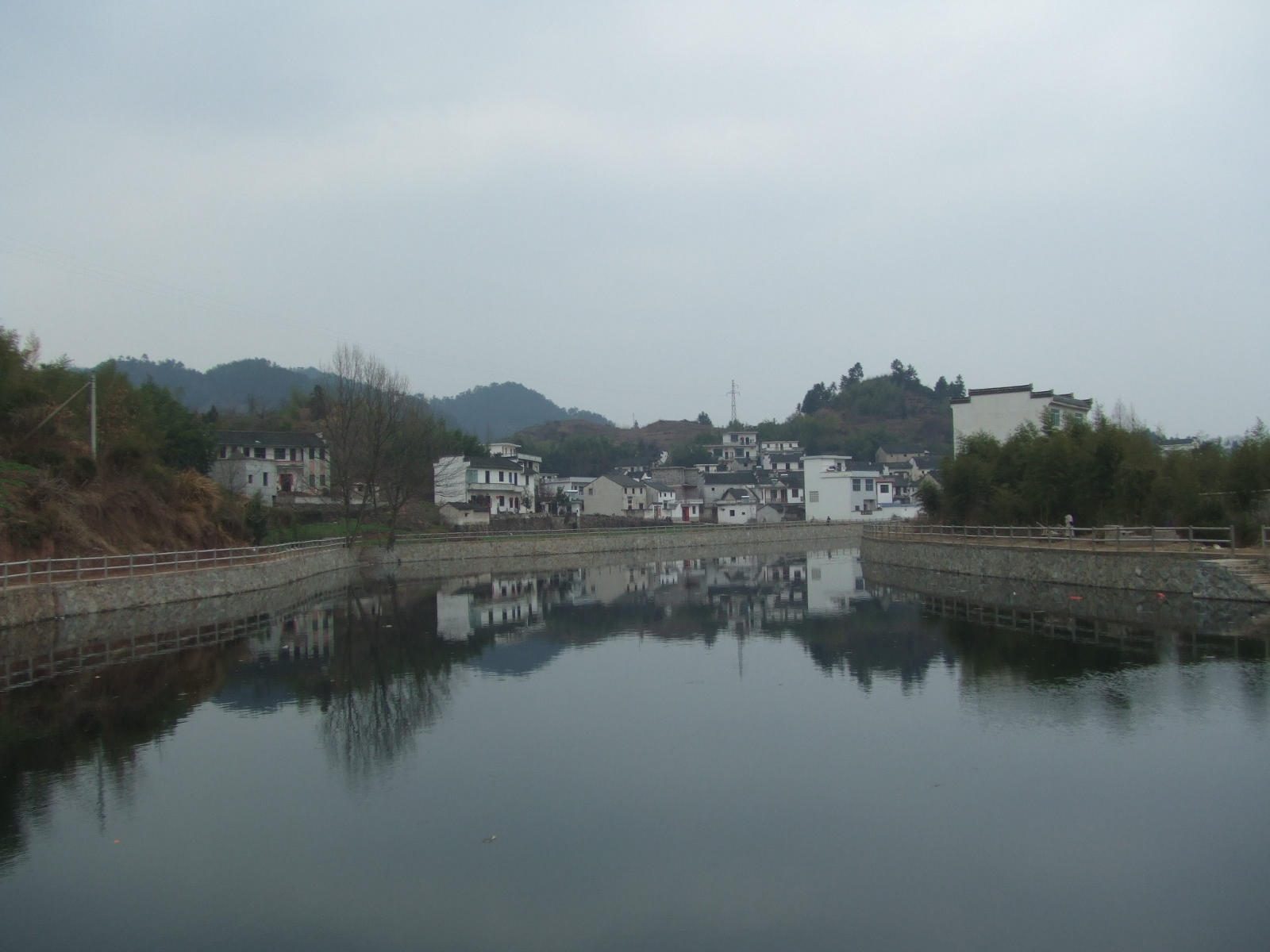 綿溪河整治後外觀（FinePix Z1富士通數碼相機/洪洋/ 2005/09/25）